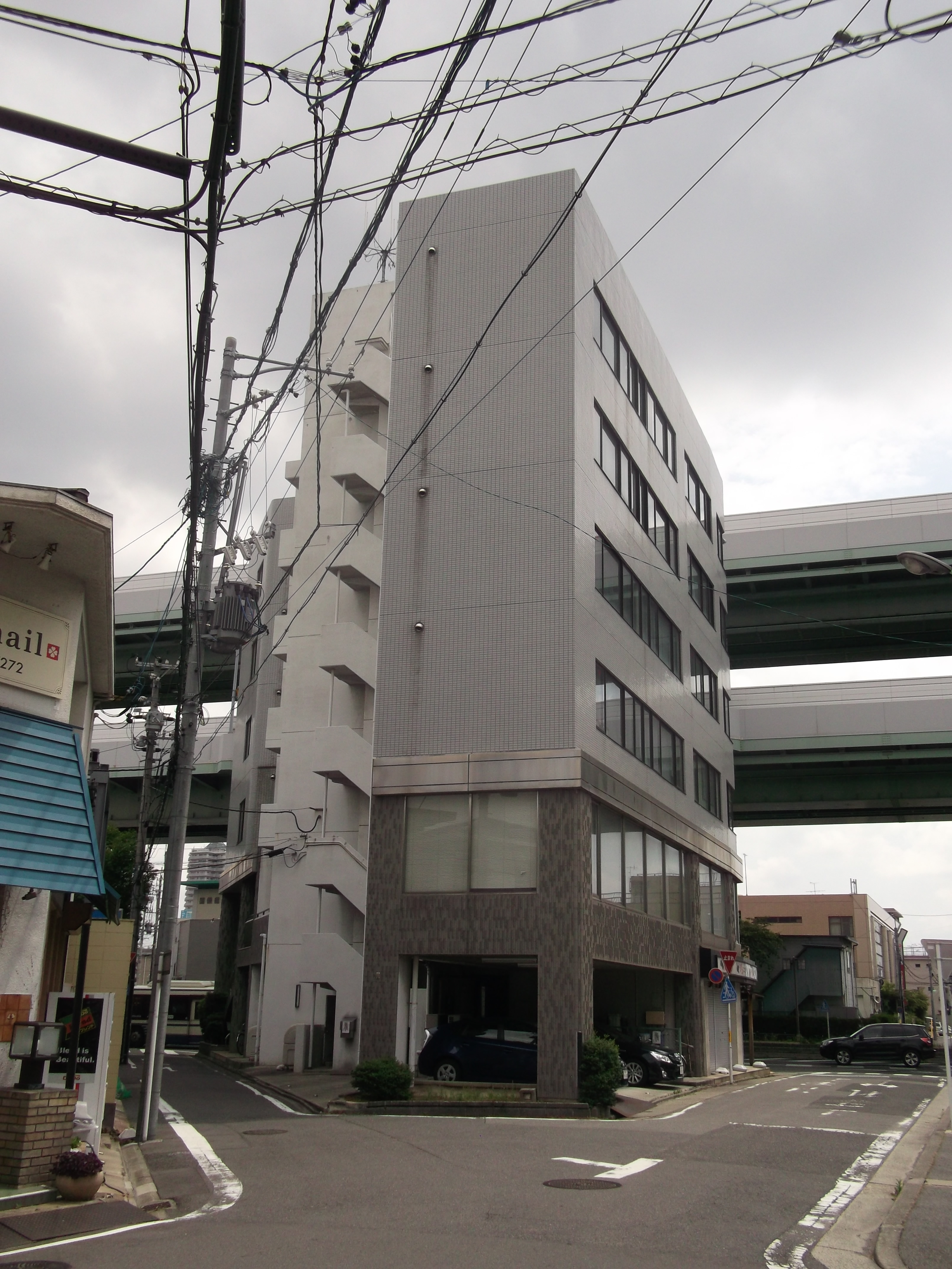 名古屋市北区の日宝黒川ビルを西側公道より写す